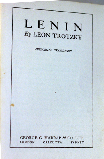 Trotsky - Lenin (incl. Nationalism in Lenin, 1925, cover)